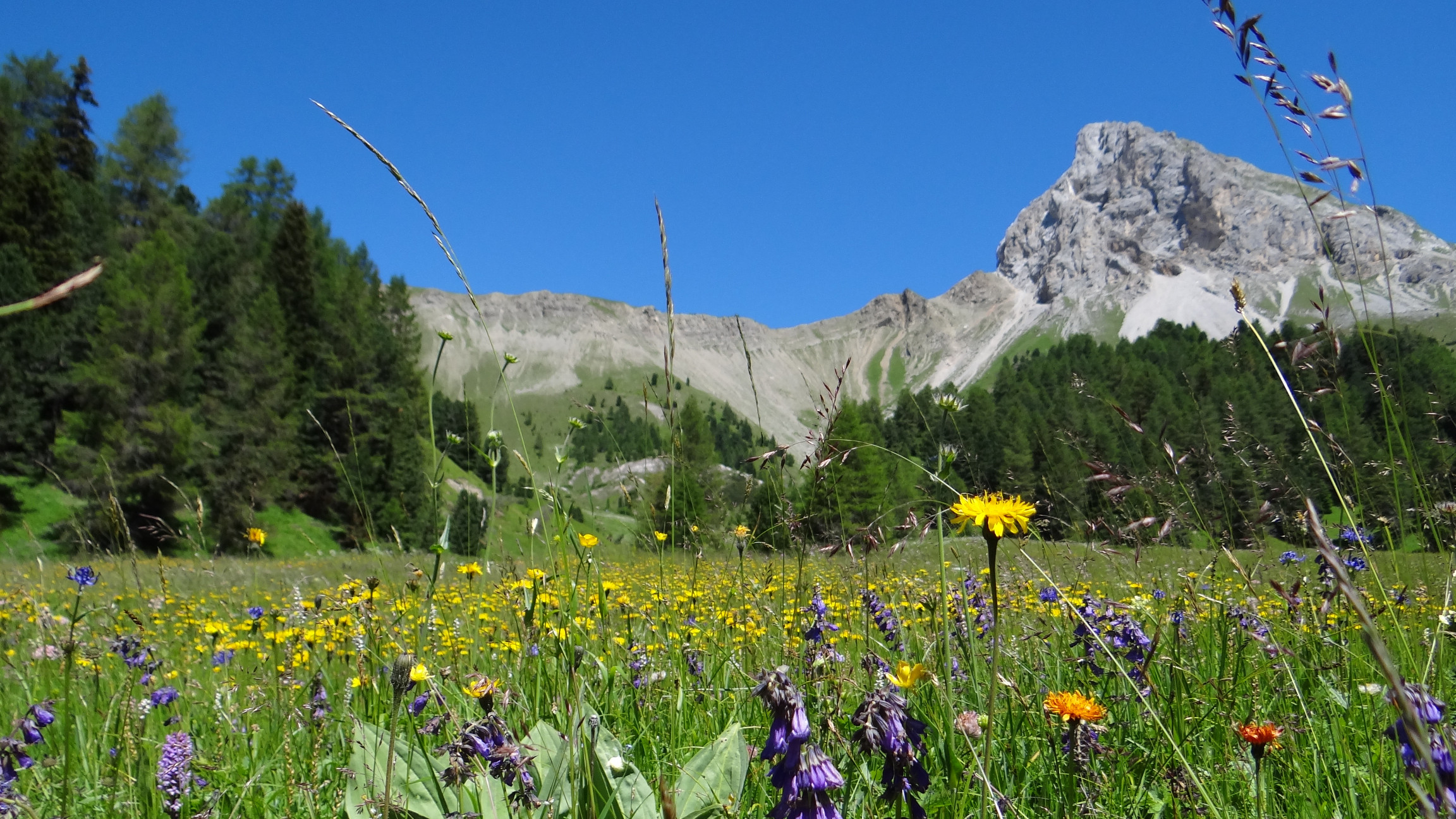 Val San Nicolò (Q49967187)